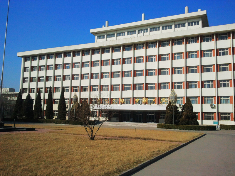 南开大学迎水道校区教学楼（原天津外贸学院主楼）